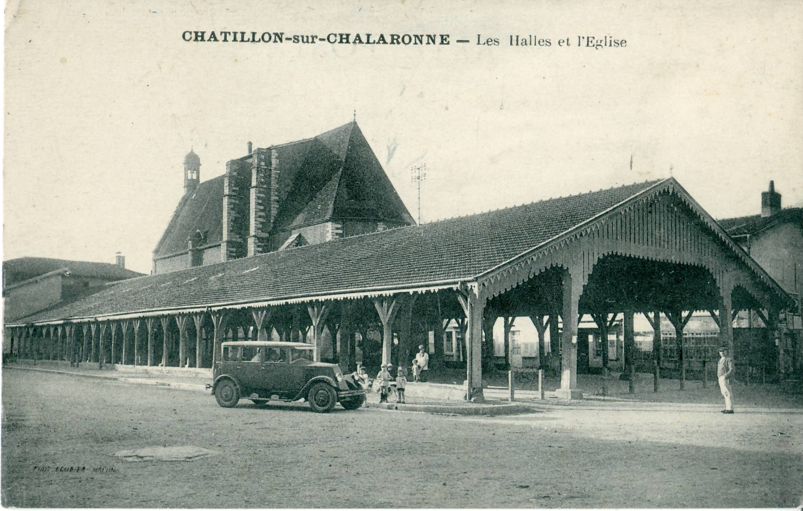 Carte postale éditée par CIM, Combier imprimeur à Macon CHATILLON SUR CHALARONNE - Les Halles et l'église